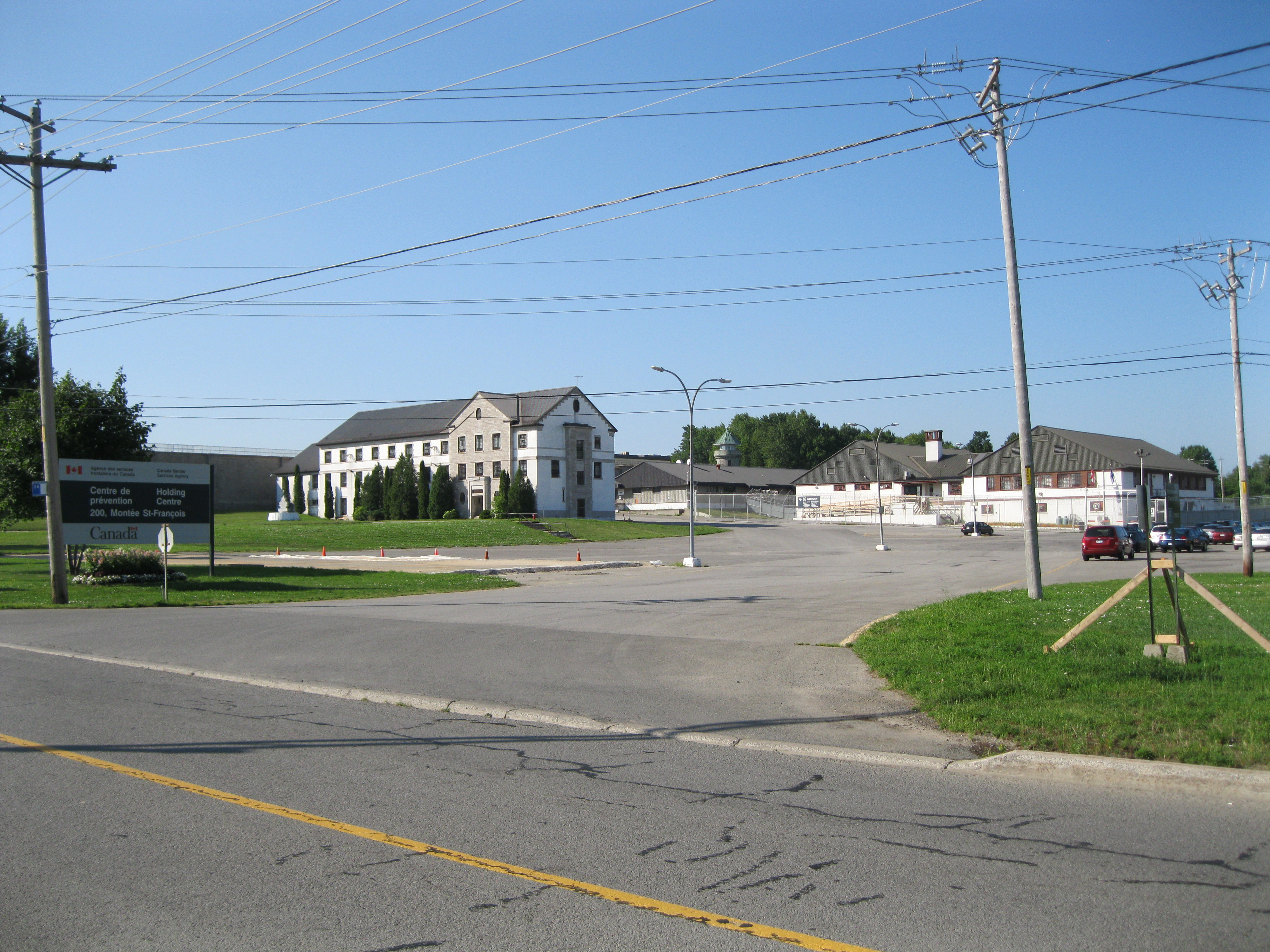 Le gouvernement fédéral possède plusieurs installations à Laval sur la montée Saint-François